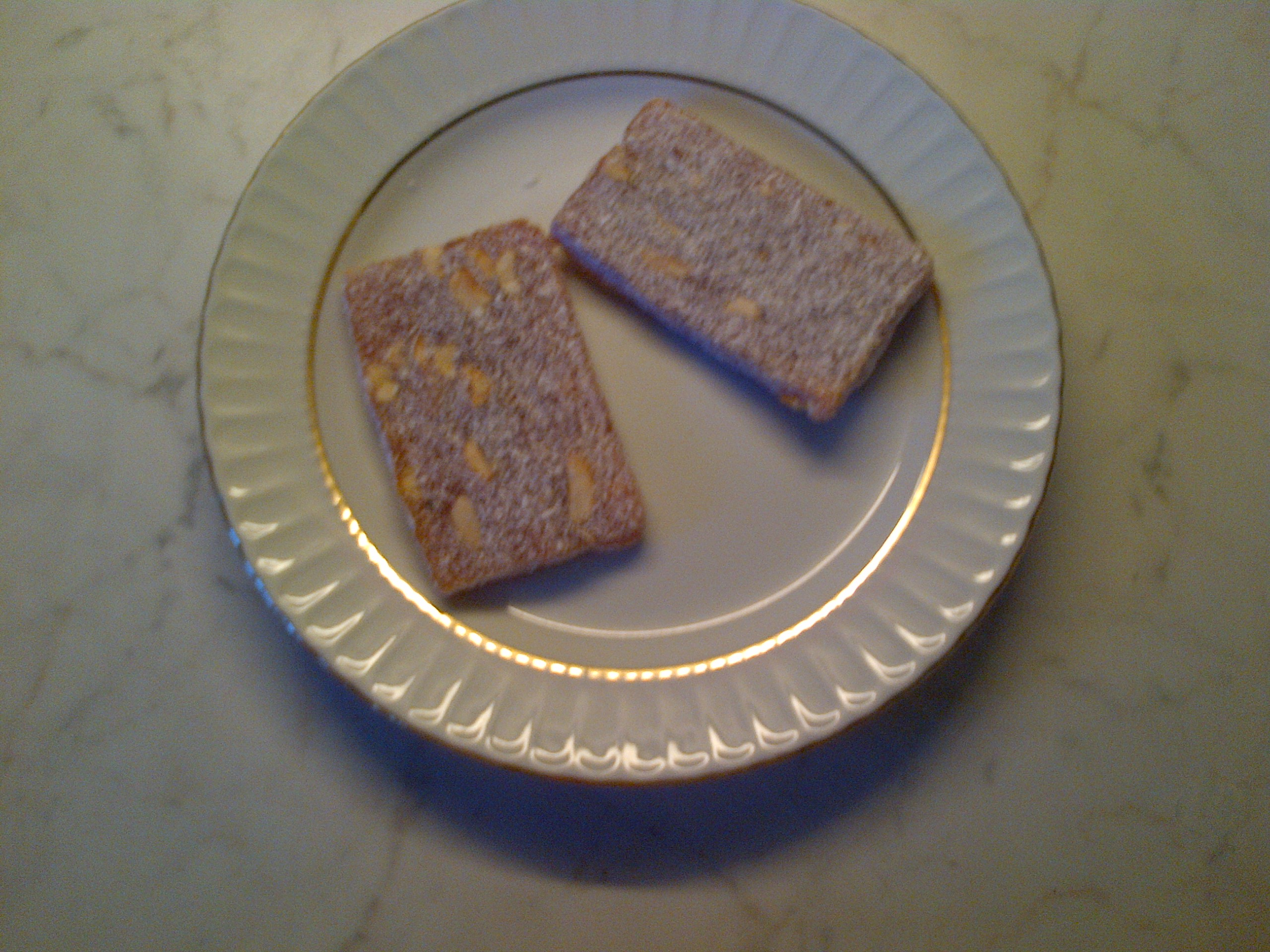 Cezerye amb cacahuets